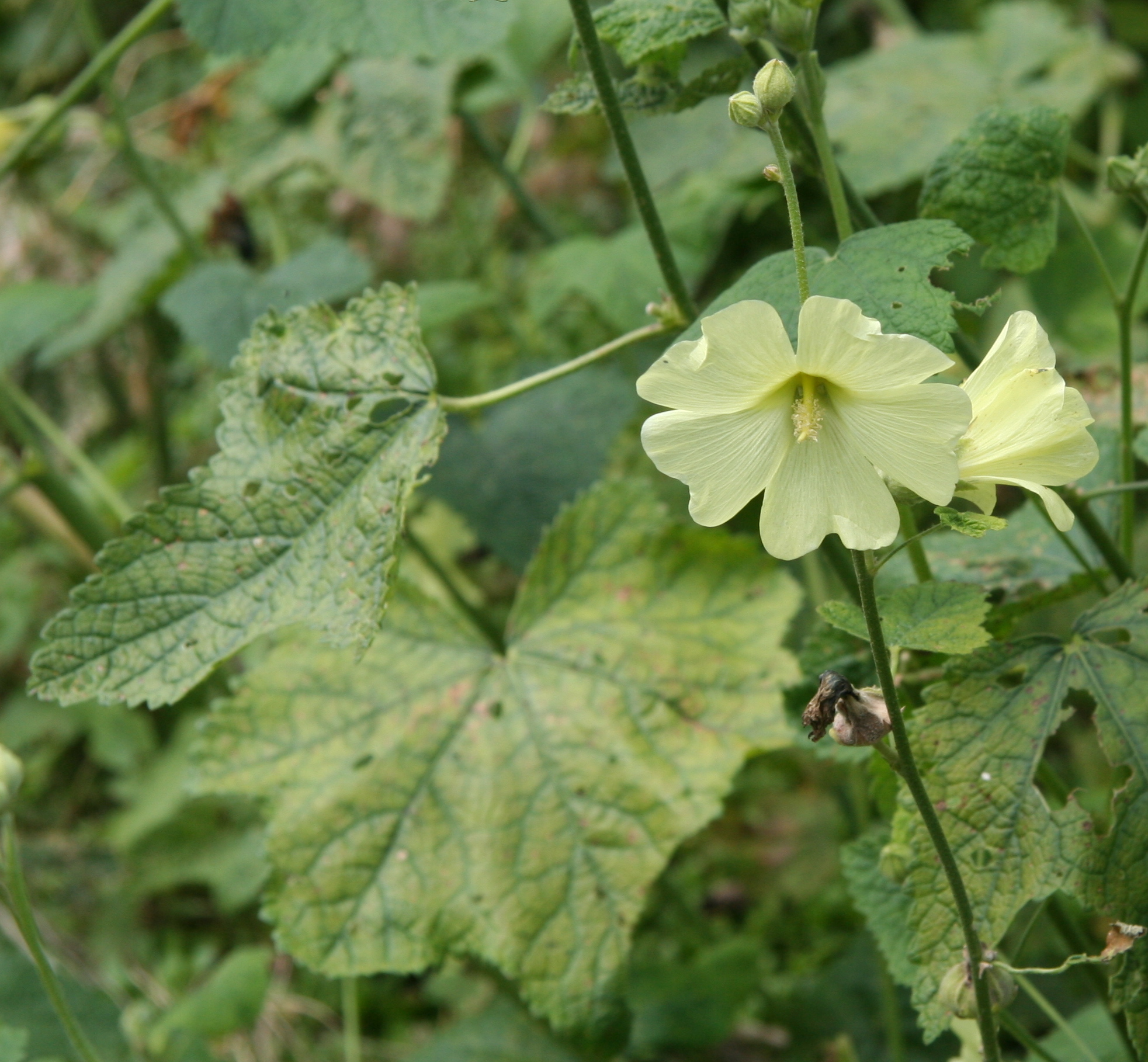 Alcea rugosa im Botanischen Garten Dresden